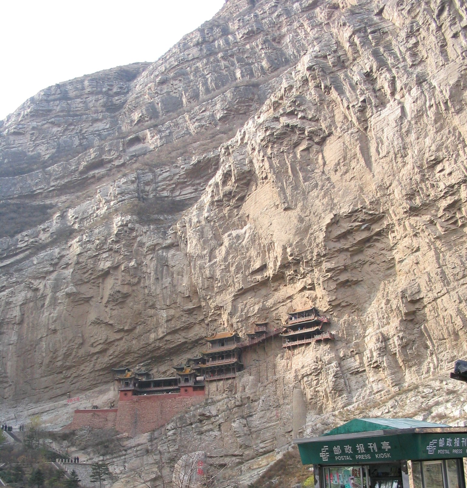 Hanging Monastery, Jinlong Canyon, near Datong, Shanxi province, China.